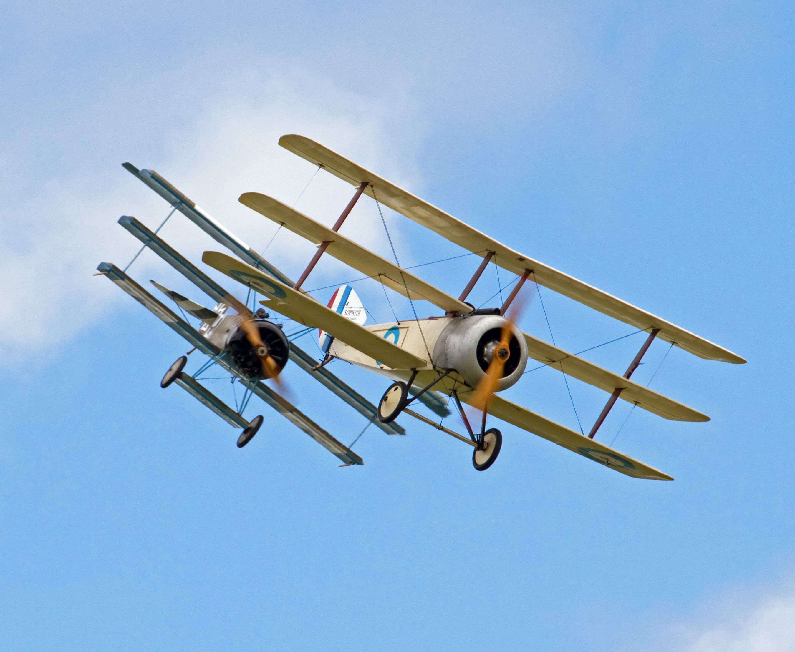 Triplanes